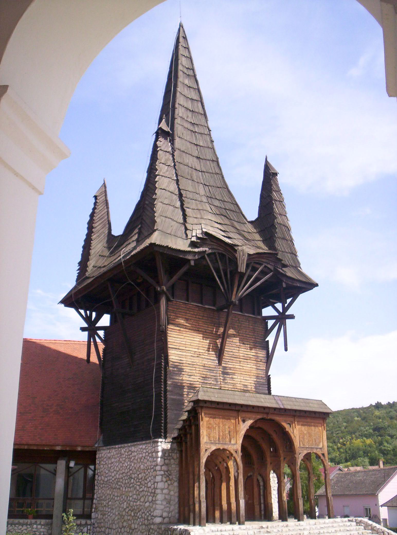 A kakasdi Faluház. Tervezte: Makovecz Imre (1994) – photo taken by uploader User:Csanády in 2006.